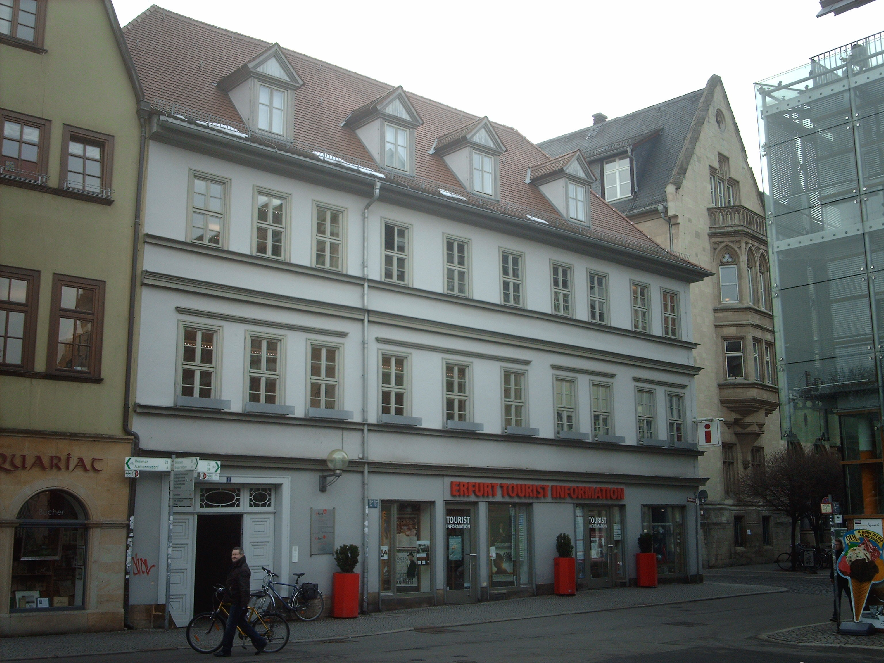 Touristeninformation am Benediktsplatz in Erfurt.